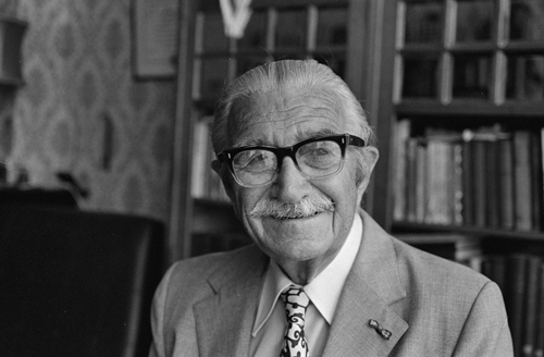 Ad van Emmenes.